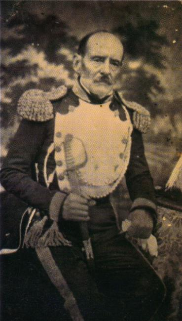 Fotografía de Juan Spikerman (1806 -1863), militar uruguayo de las luchas por la independencia.